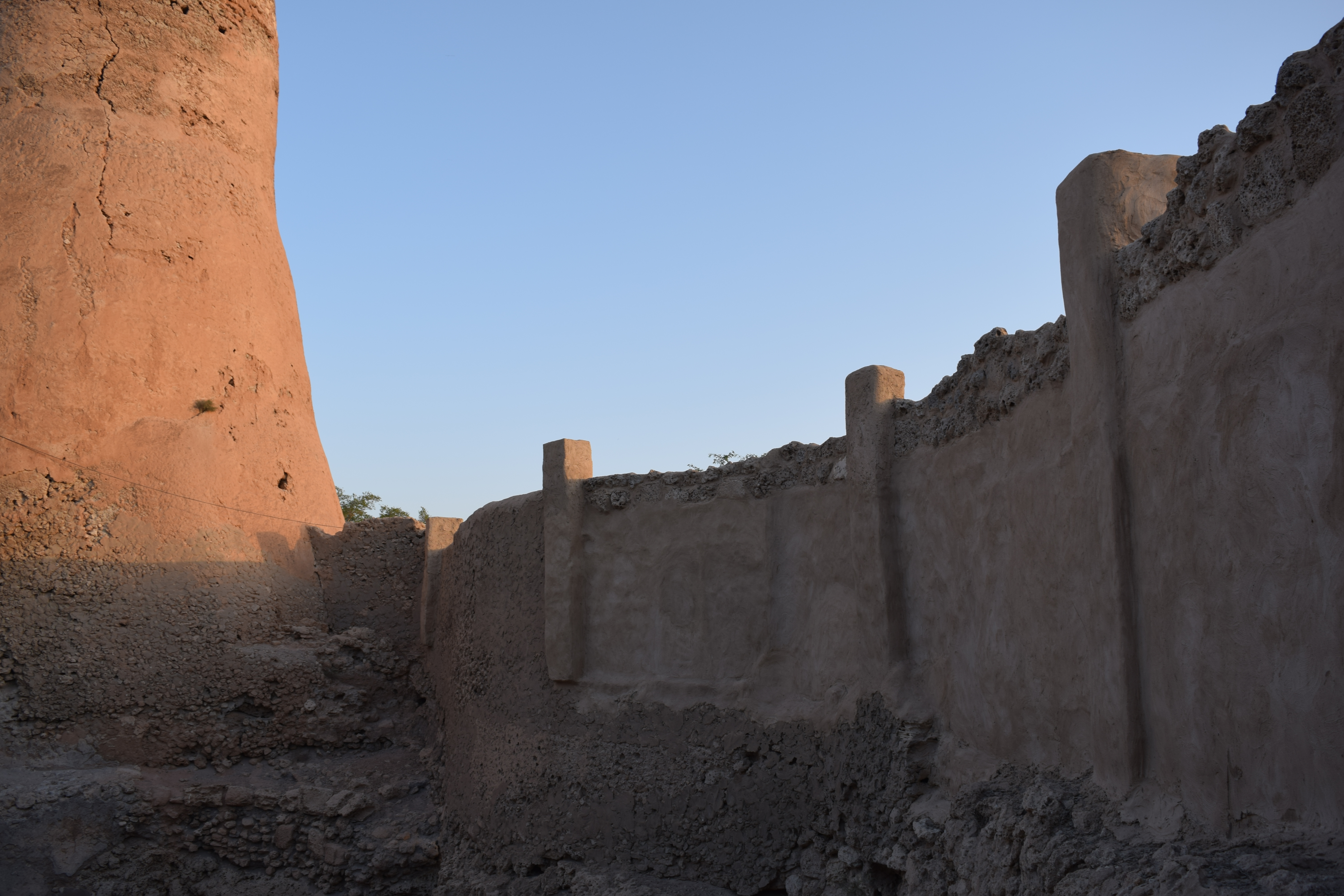 سور عين العودة بجانب البرج الشمالي الشرقي